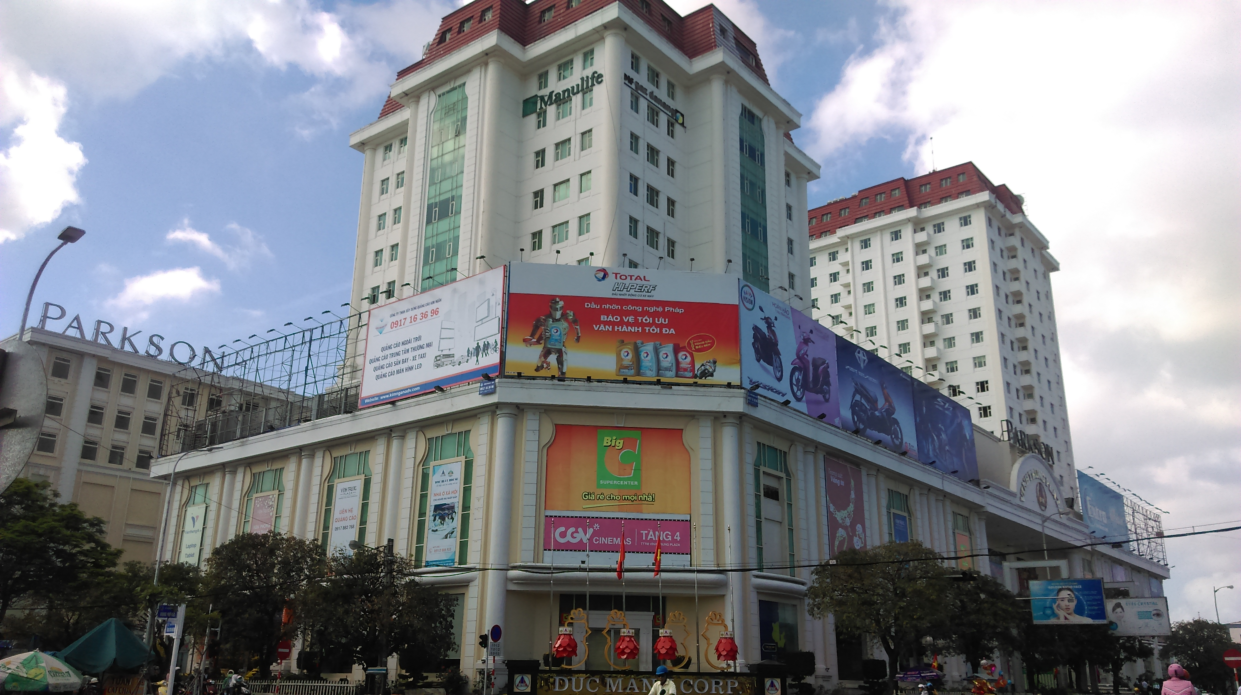 Big C Đà Nẵng